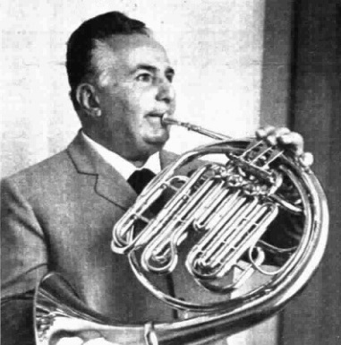 Italian musician Domenico Ceccarossi